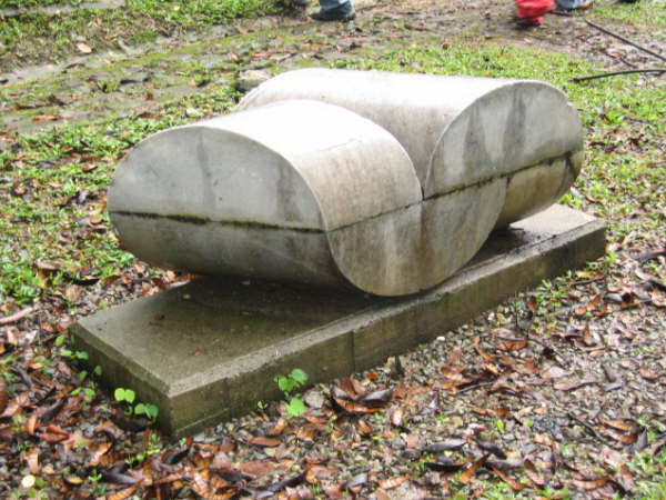 Escultura en el Cerro Nutibara, Medellín